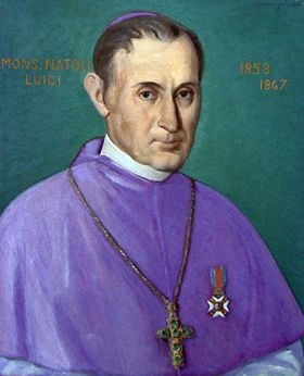 Luigi Natoli, Arcivescovo di Messina